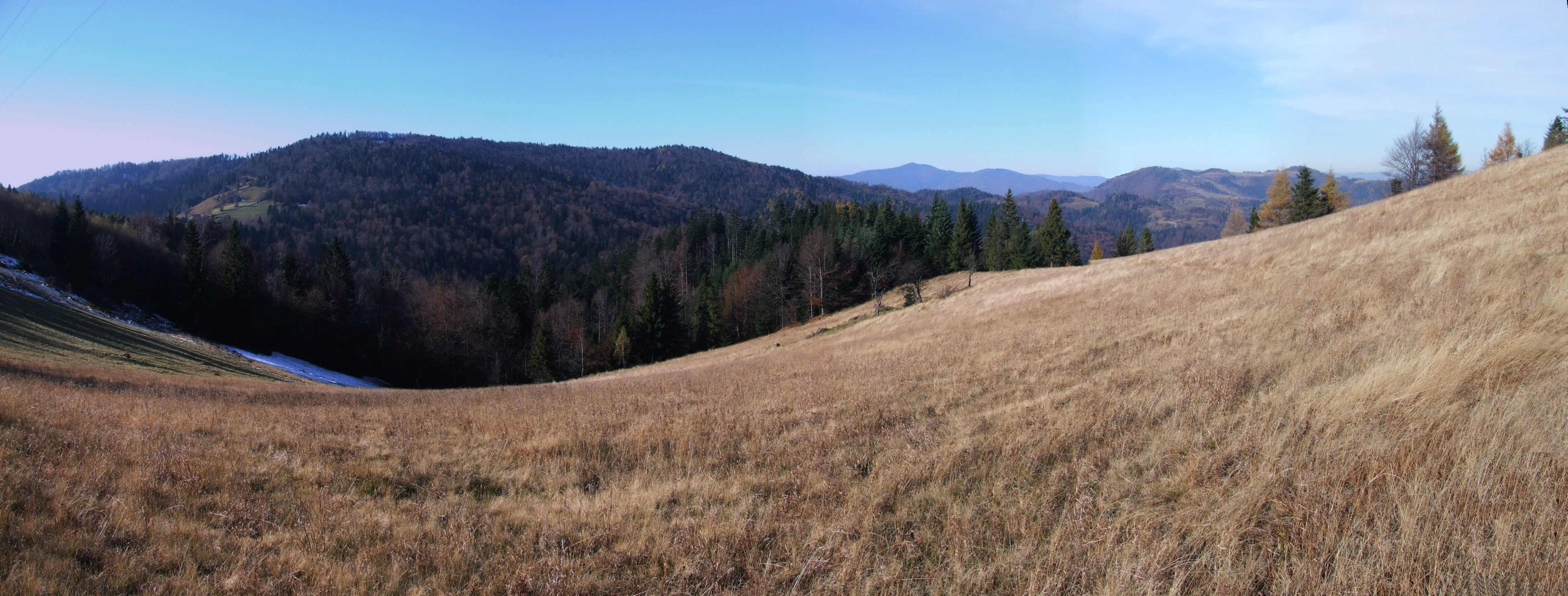 Polana Krótka w Paśmie Radziejowej (miejscowość Obidza). Po lewej stronie przełęcz Przysłop, u góry Dzwonkówka. W głębi widoczny Lubań i Pasterski Wierch